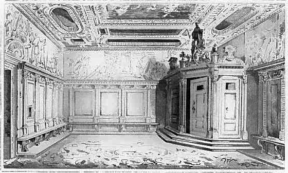 f. zanotto